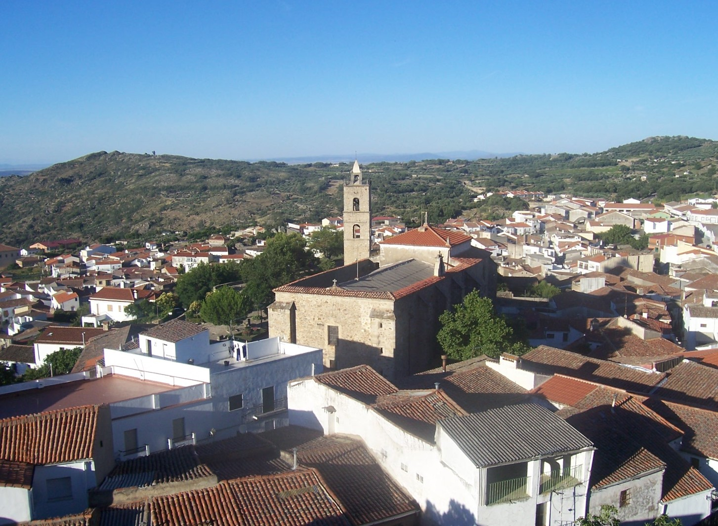 Iglesia y alrededores en Montánchez, provincia de Cáceres, España.